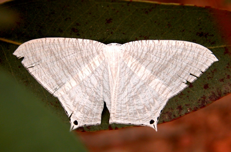 Micronia aculeata (Uraniidae, Microniinae) from Bangalore India.